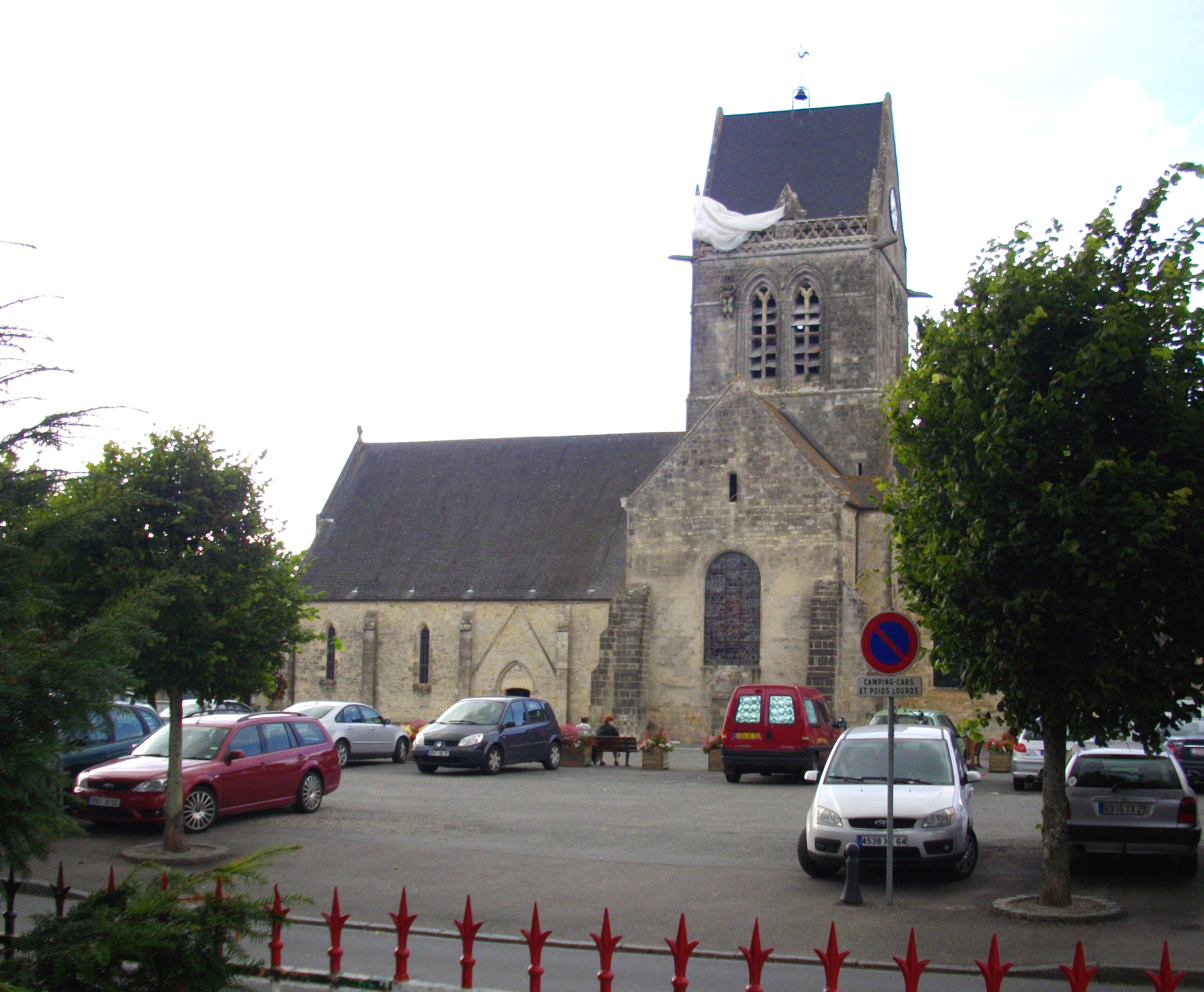 Saint Mere Eglise, church with parachute